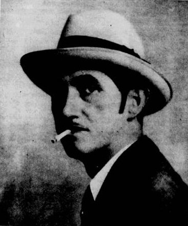 Fotografia de Ernesto Quissak, tirada por volta de 1957. Publicada na revista O Mundo Ilustrado, em 22 de maio de 1957.